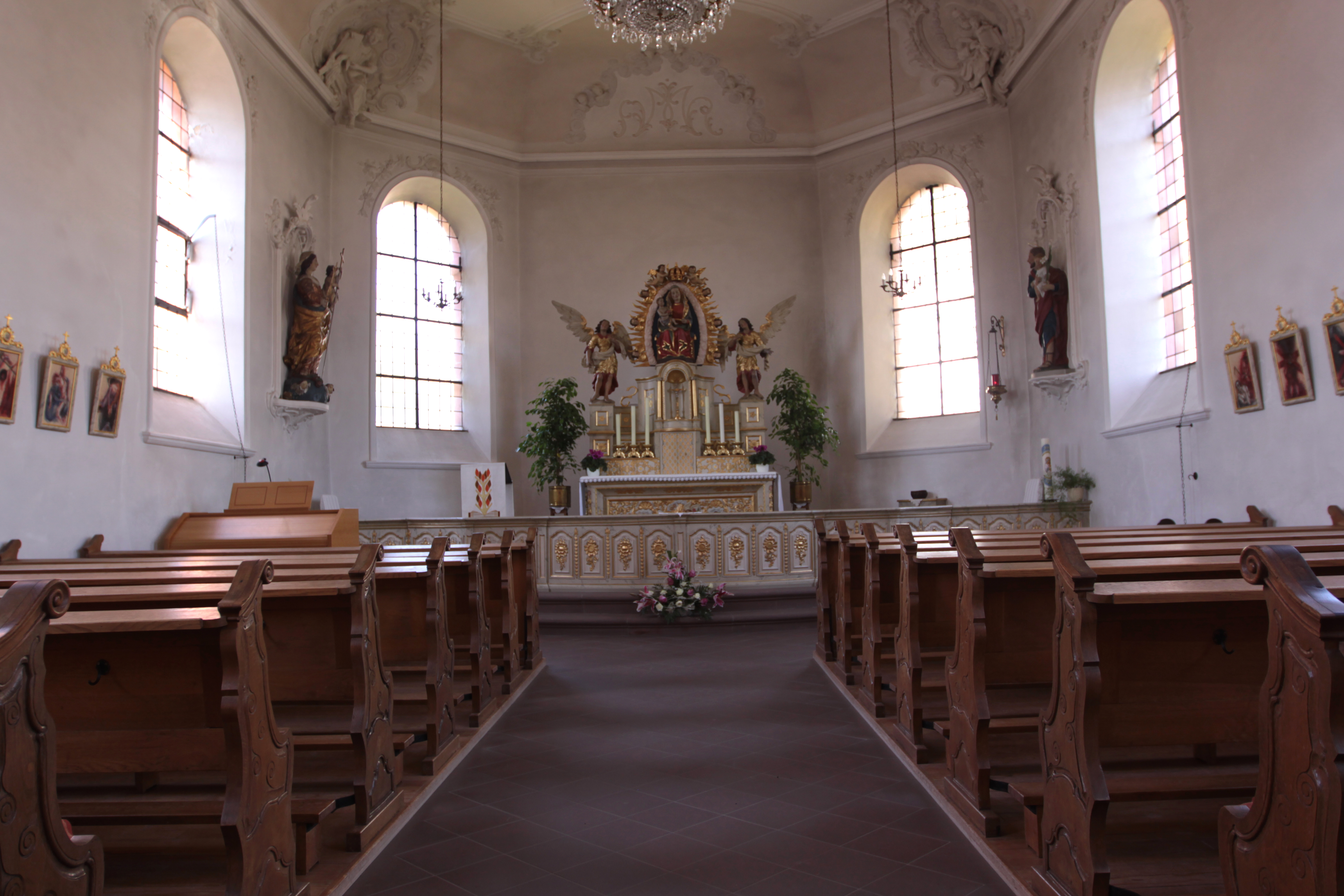 Turmstraße 6, kath. Filialkirche St. Maria, um 1750 von Christian Kretzschmar (Einzeldenkmal)